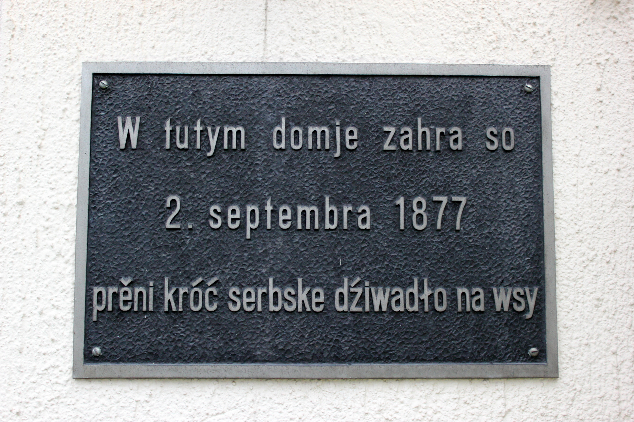 Hornjoserbsce: Lejno; wopomnjenska tafla při hosćencu.